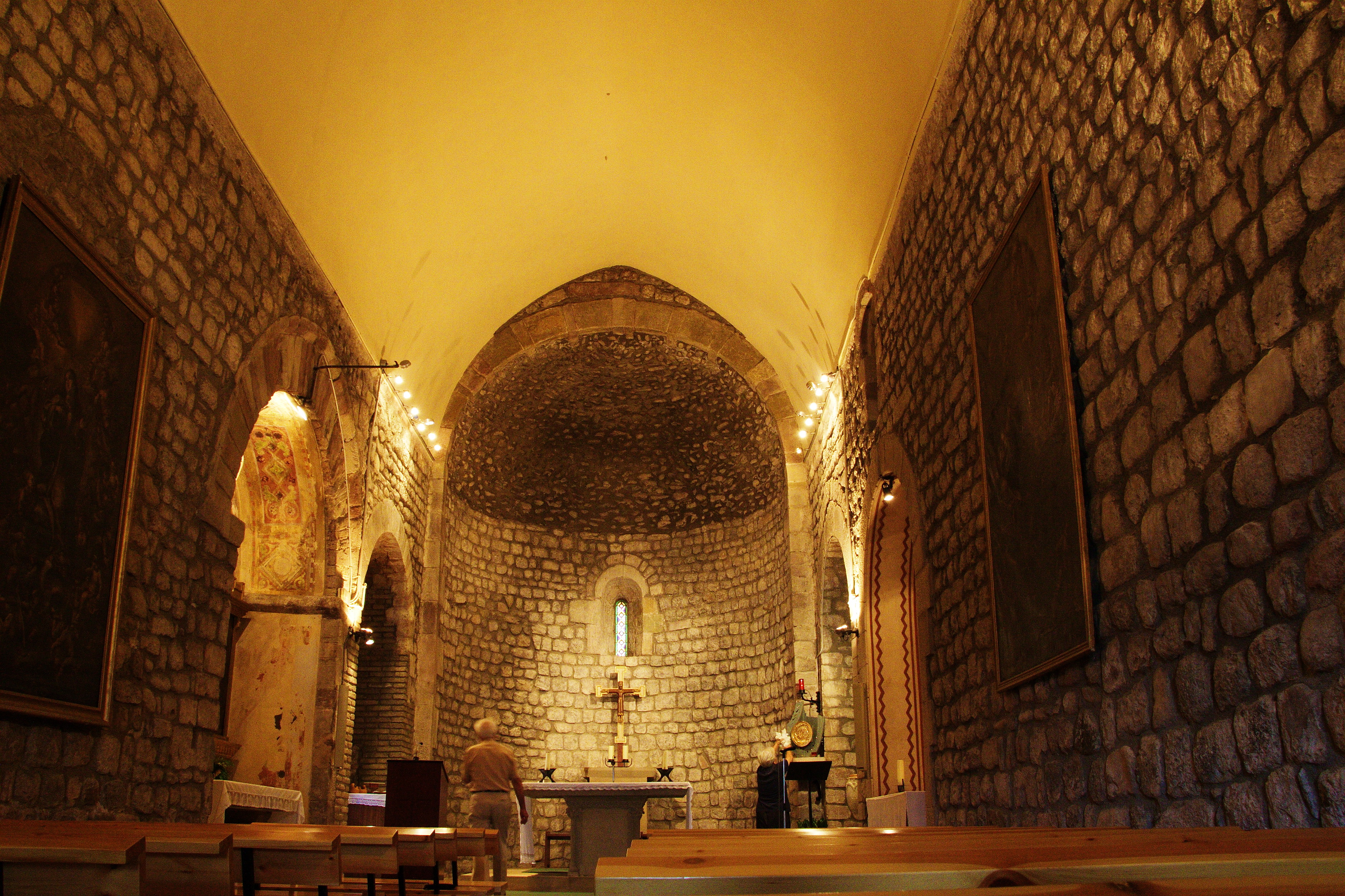 Església parroquial de Sant Feliu (Canovelles) Object location41° 40′ 13″ N, 2° 19′ 43.66″ E